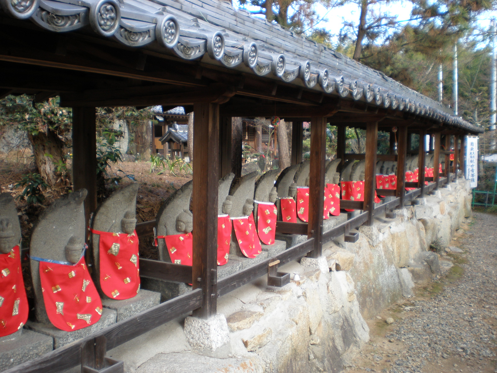 愛知県小牧市岩崎にある観音寺